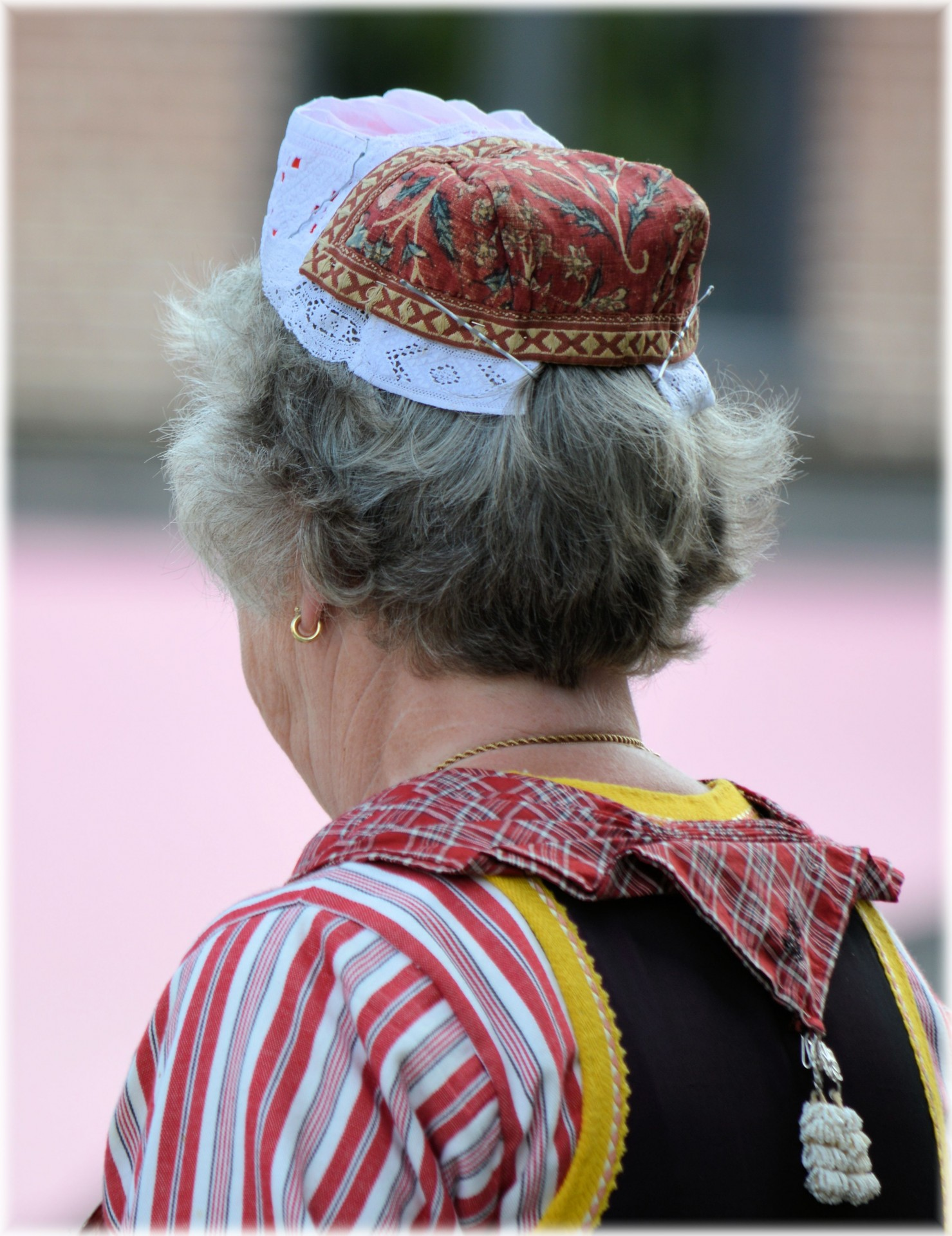 Muts en mouwen van klederdracht Marken